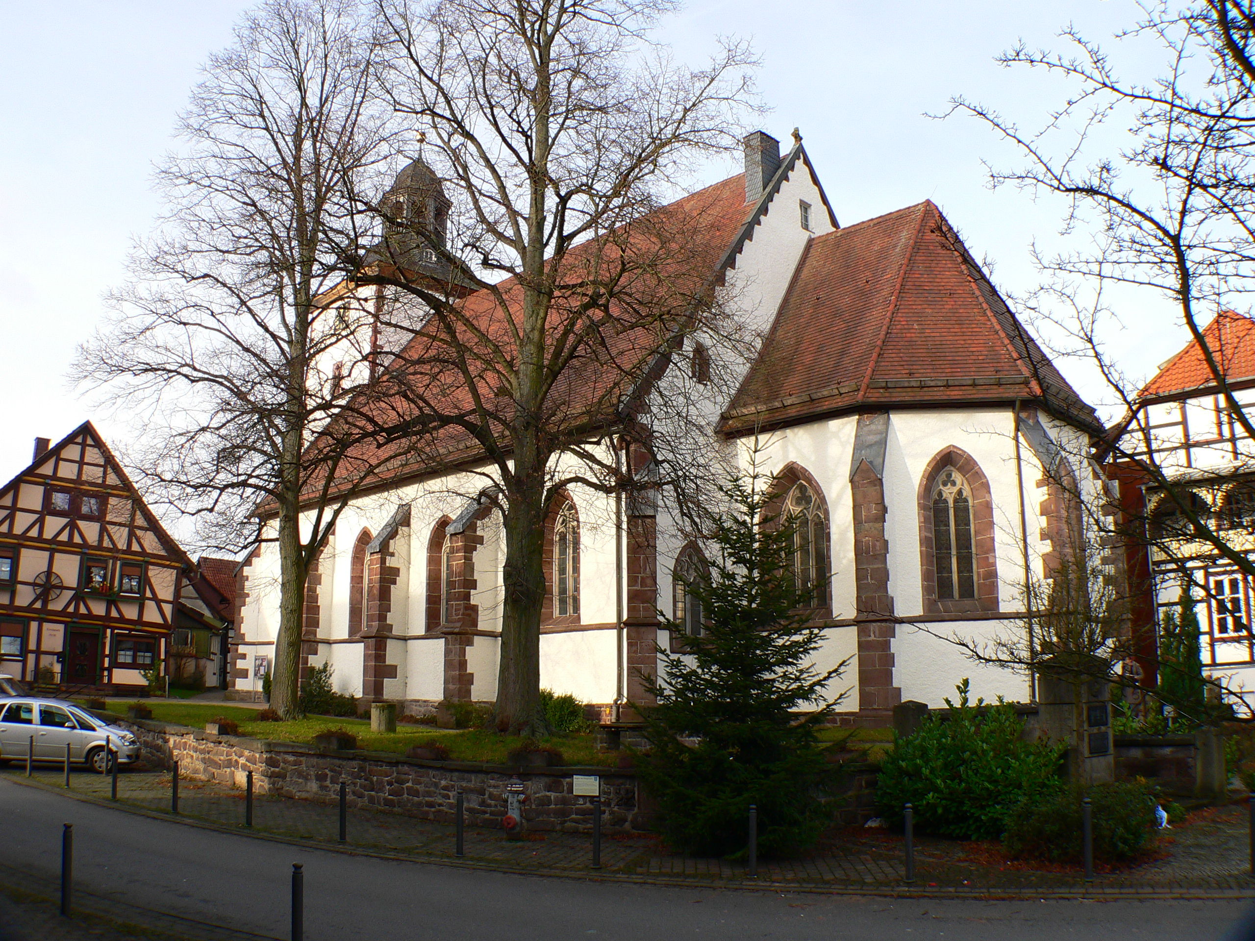 Evangelische Kirche St. Laurentius in Dassel, Niedersachsen, Deutschland - Südansicht